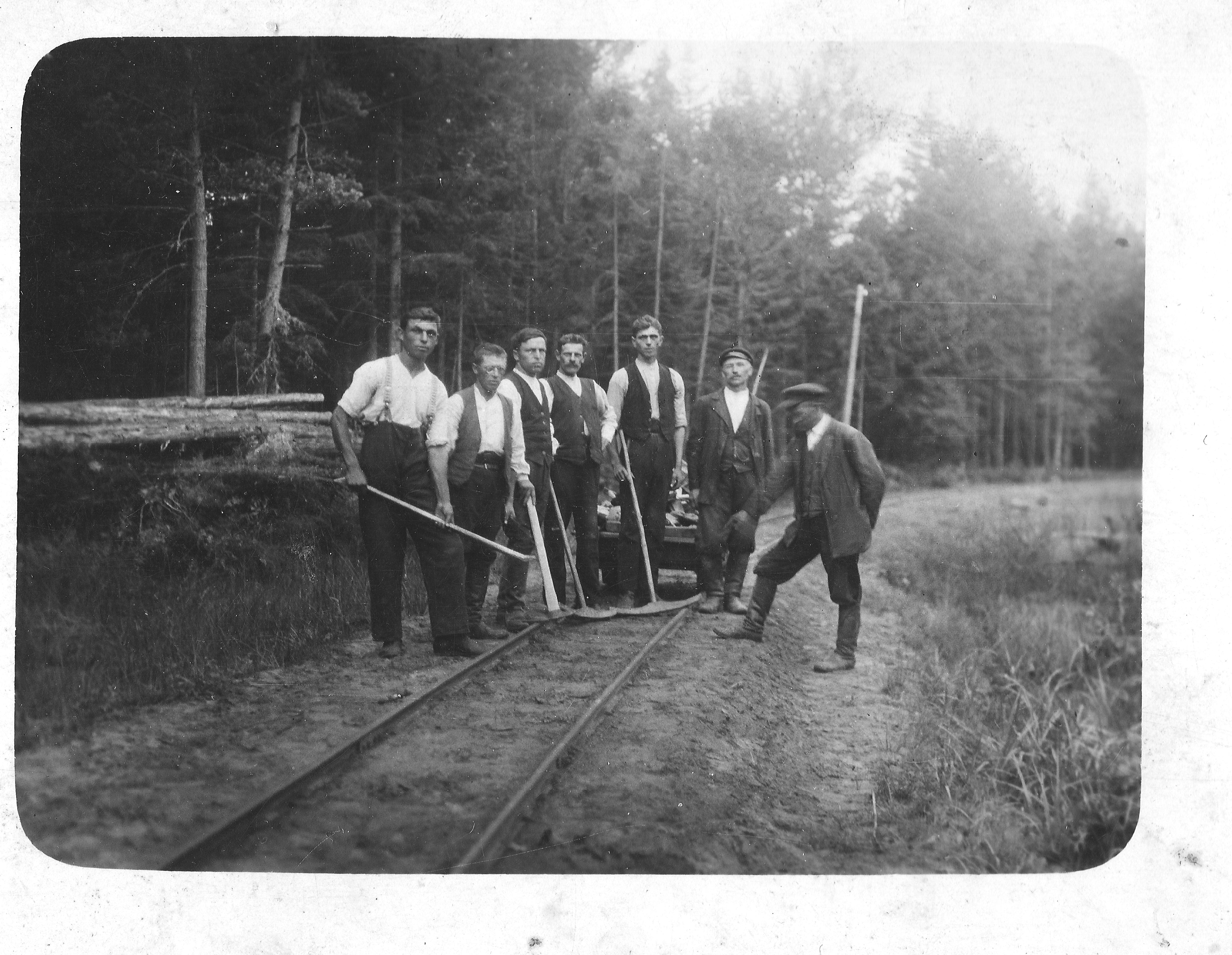 Pracownicy Świetokrzyskiej Kolei Leśnej (okolice Zagnańska)